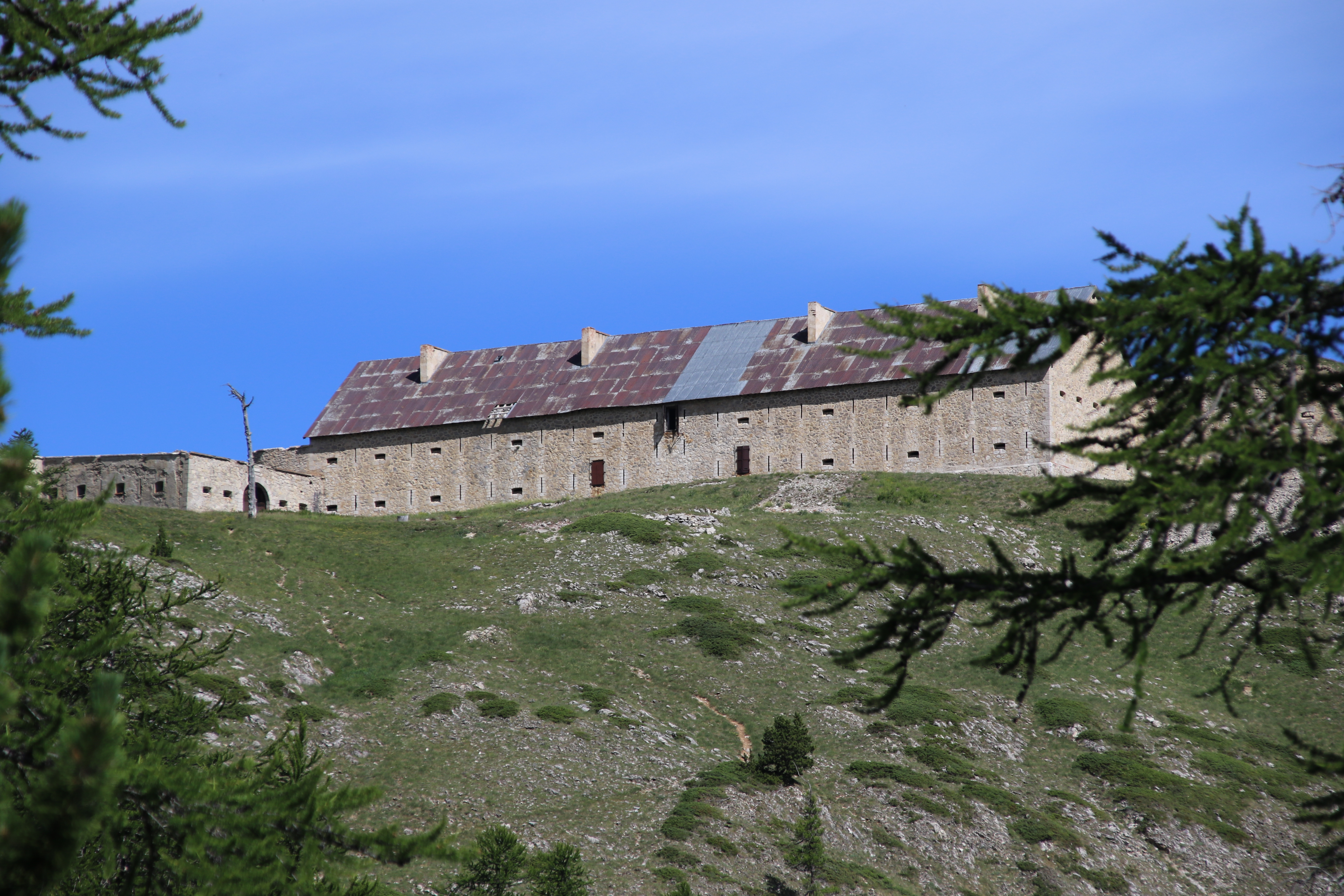 Vue sur le casernent de paix du fort de l'Olive